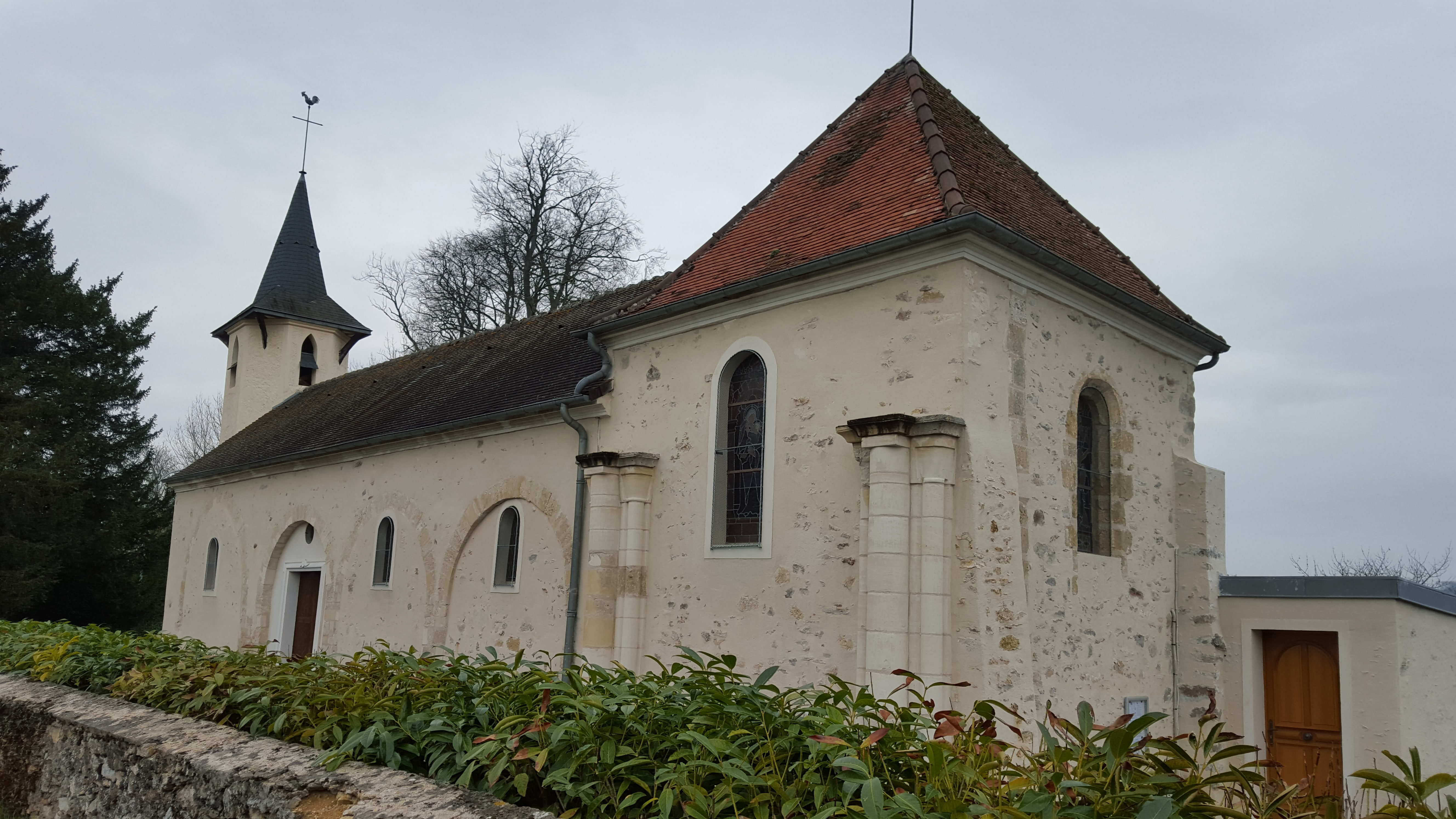 Chierry - Eglise Saint Leu